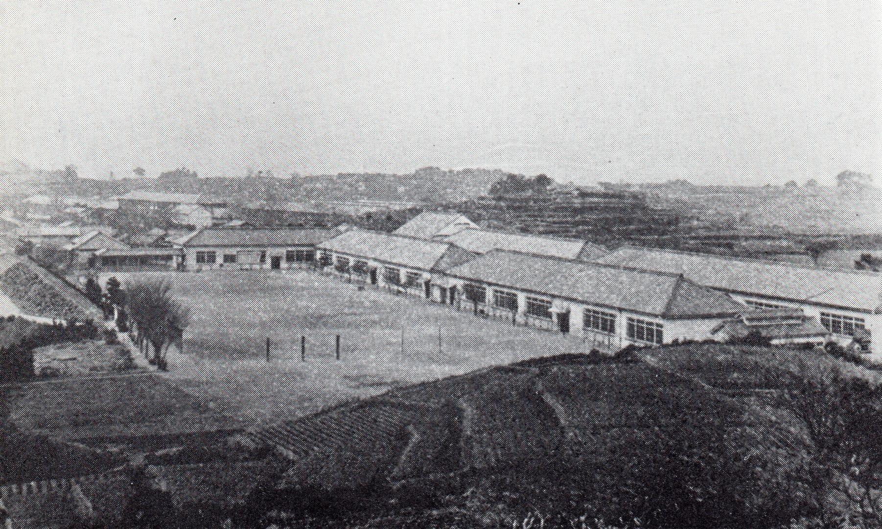 岡崎市梅園尋常高等小学校（現在の岡崎市立梅園小学校）